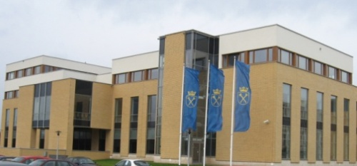 II UJ w Krakowie